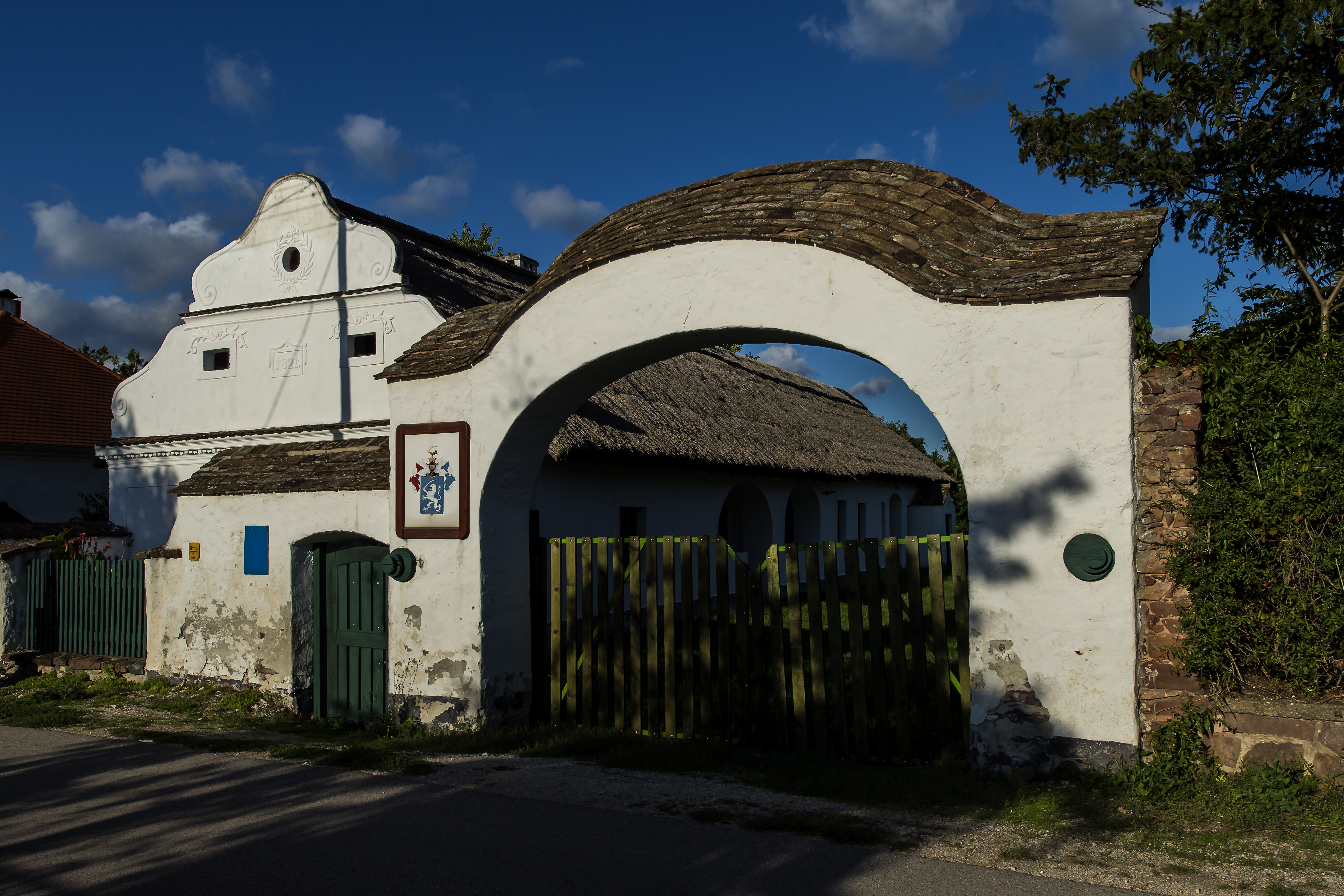 Kővágóörs, tájház This is a photo of a monument in Hungary. Identifier: 9952